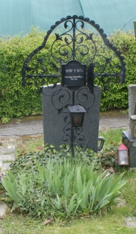 Friedhof Neustift-Ernst Hilger